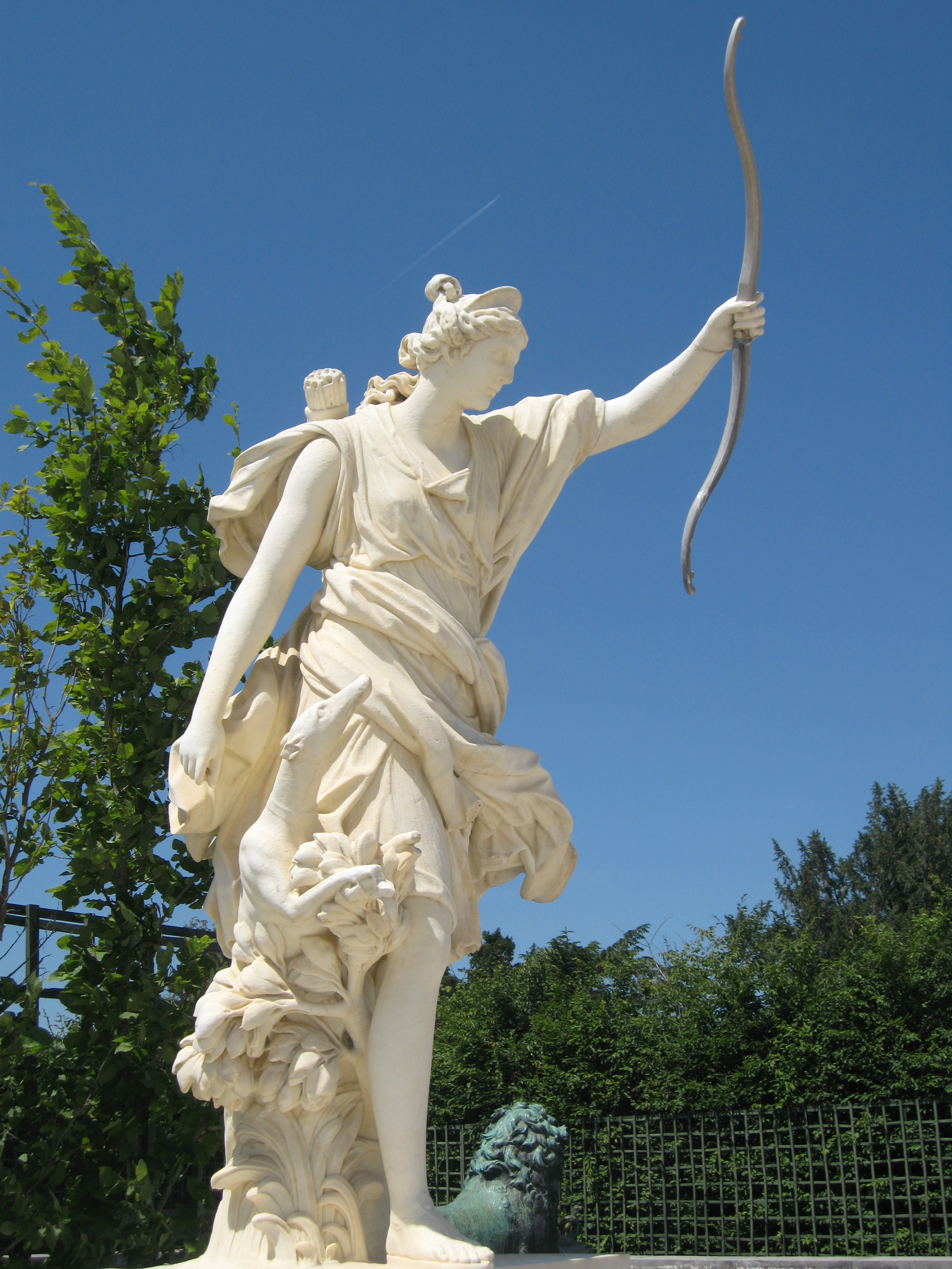 Le Soir, par Martin Desjardins